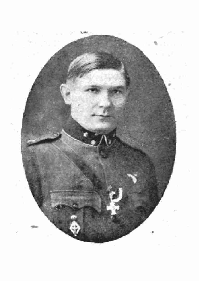 Eesti ohvitser Theodor Rõuk. Foto koopia on pärit Kindralstaabi Walitsuse arhiviist.